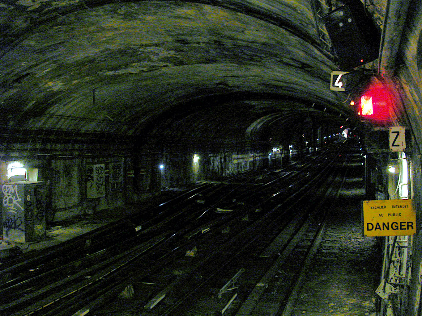 Tunnel au nord de la station Place de Clichy de la ligne 13 du métro de Paris, France.